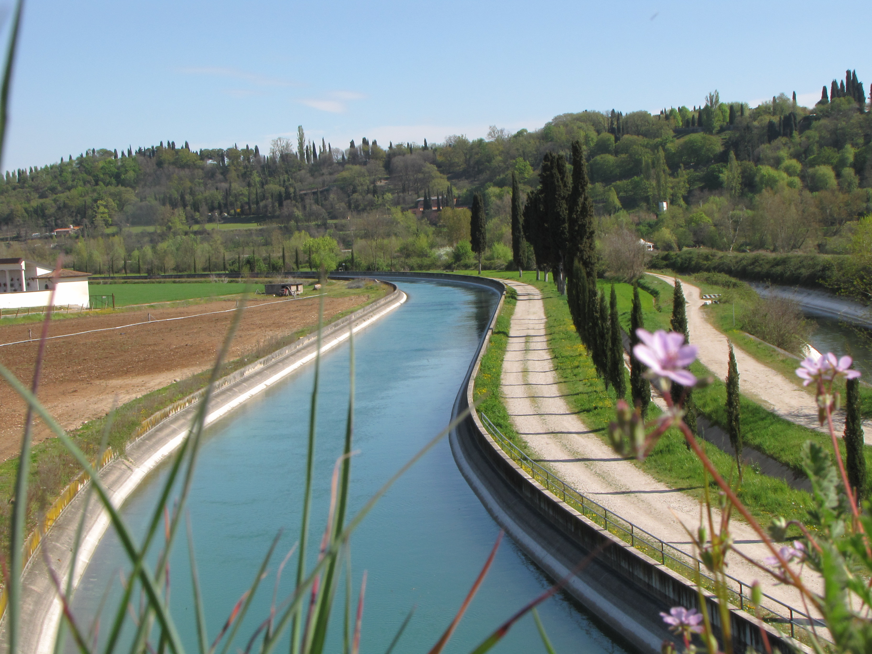 Il Canale Virgilio, opera irrigua del Consorzio di bonifica Garda Chiese